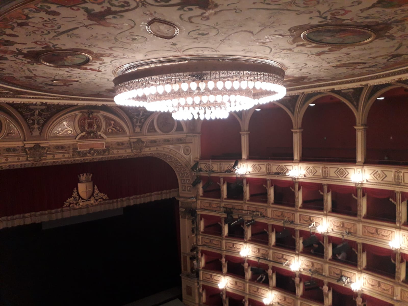 L'interno del teatro Verdi di Trieste